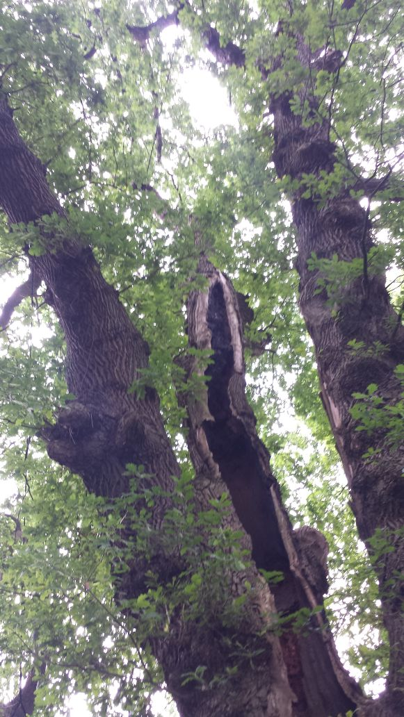 Das Foto zeigt die 3 nach oben zeigenden Starkäste.